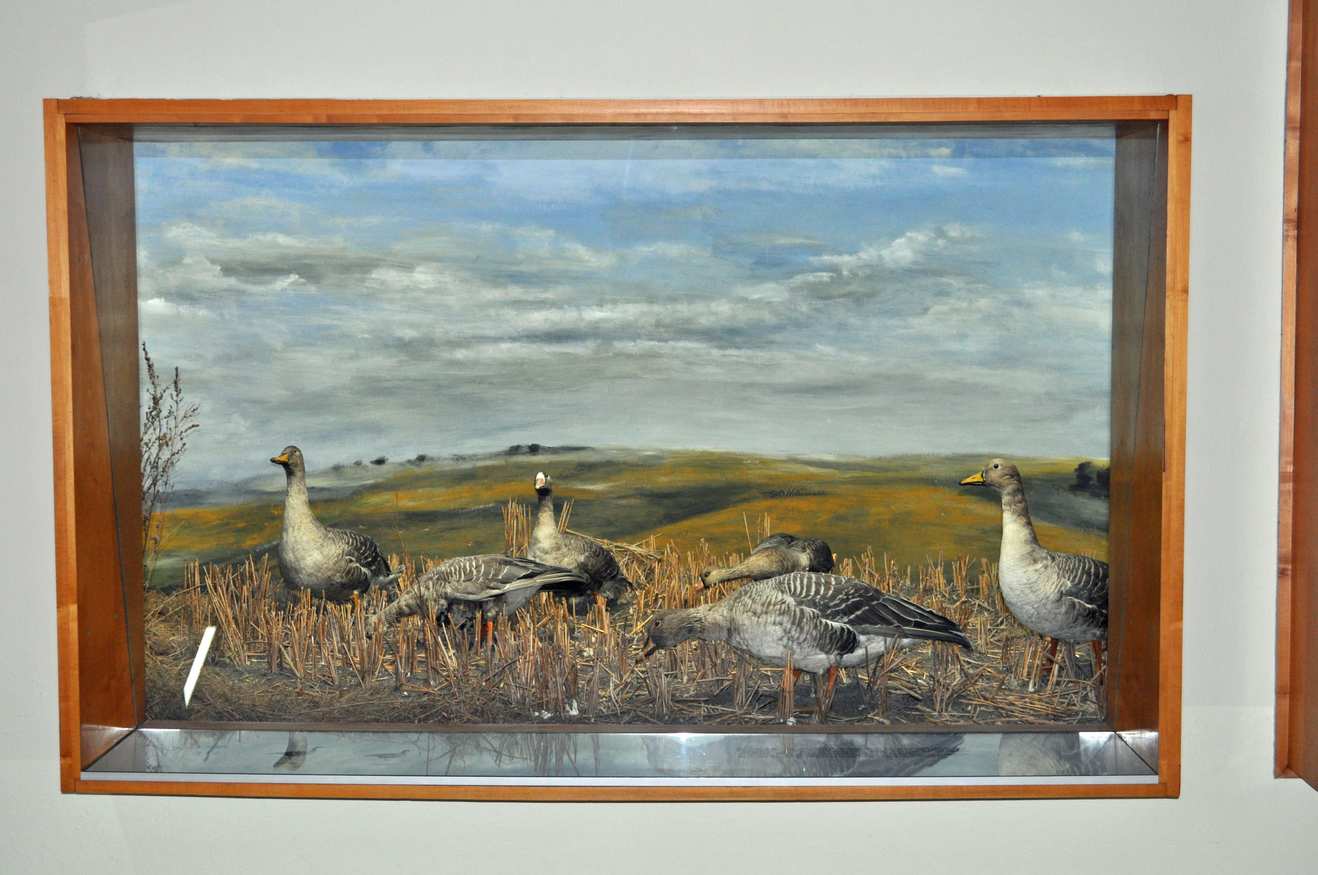 Im Meeresmuseum Stralsund. Das Deutsche Meeresmuseum ist in der ehemaligen Katharinenkirche untergebracht.